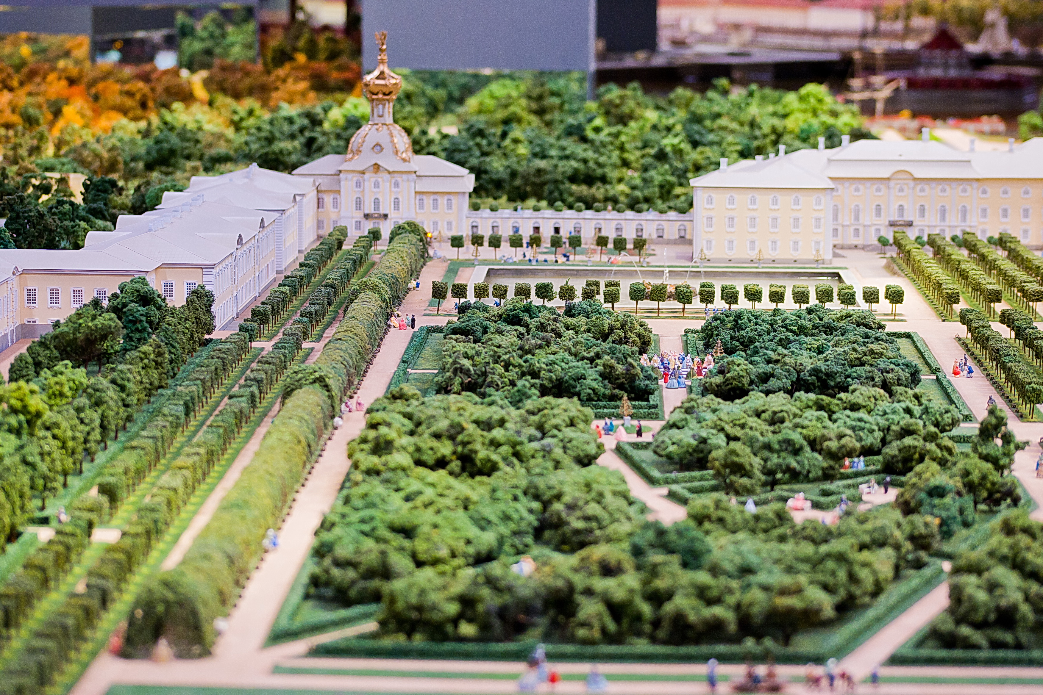 Фрагмент экспозиции в историческом театр-макете "Петровская Акватория", Санкт-Петербург